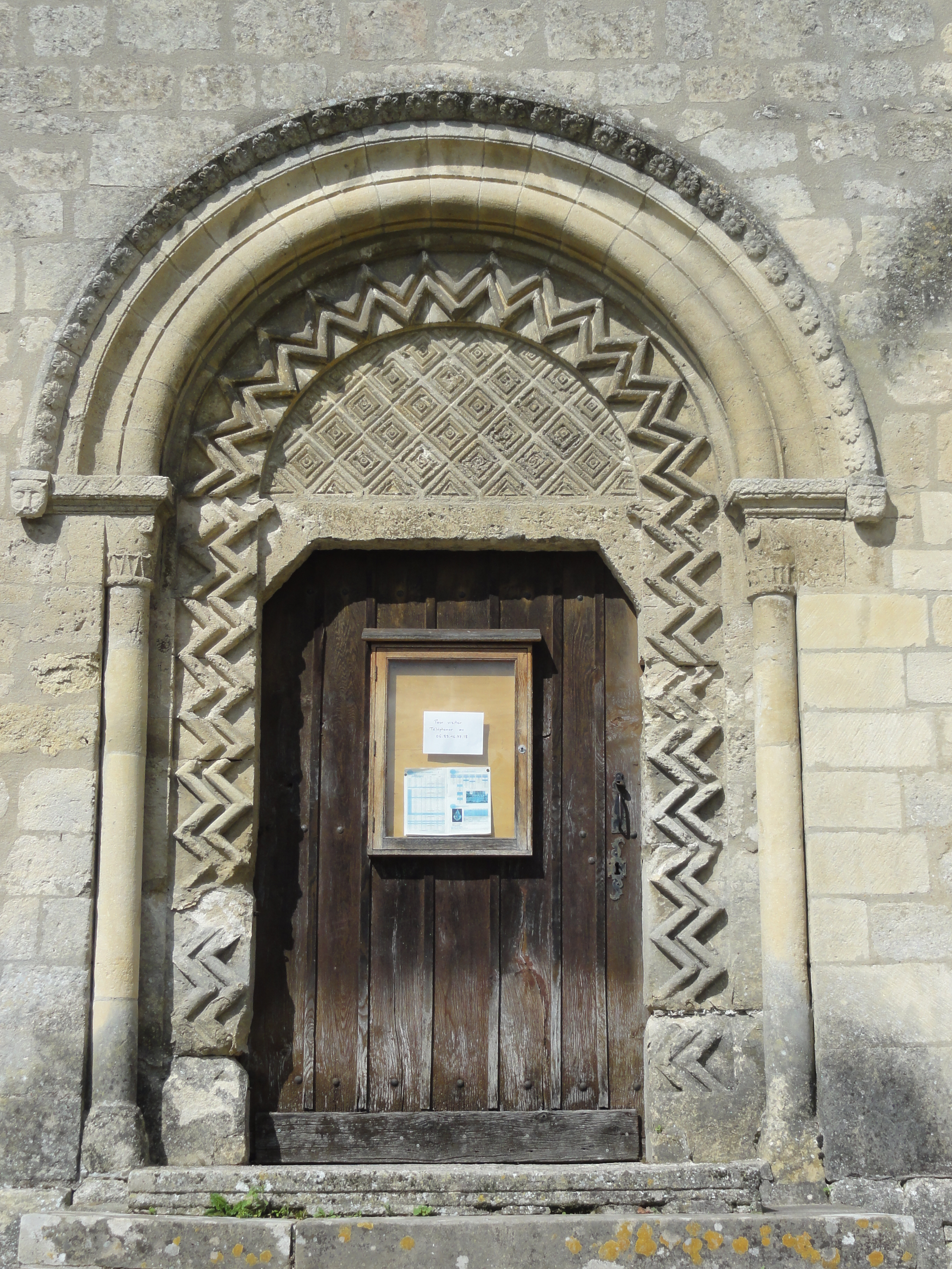 Portail principal.